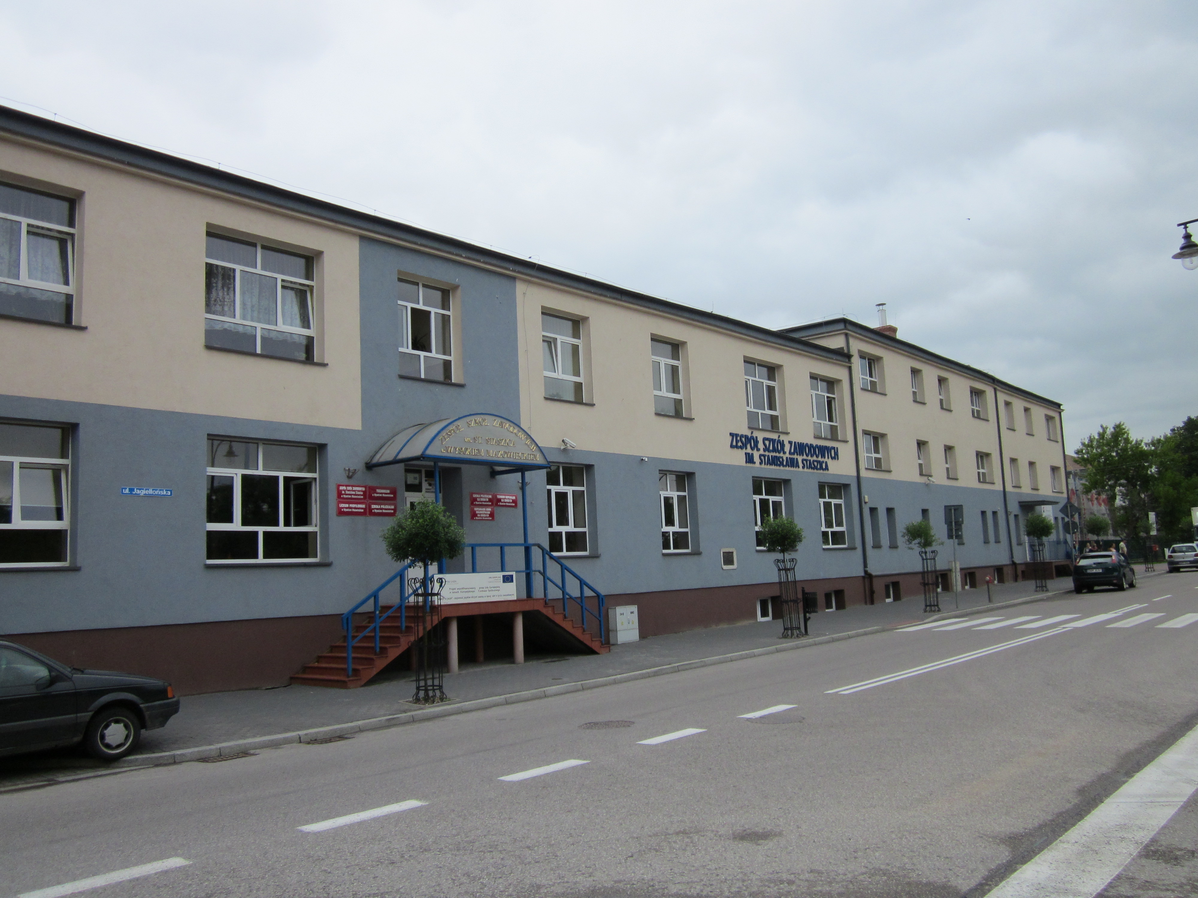 Zespół Szkół Zawodowych im. Stanisława Staszica znajduje się przy ul. Jagiellońskiej